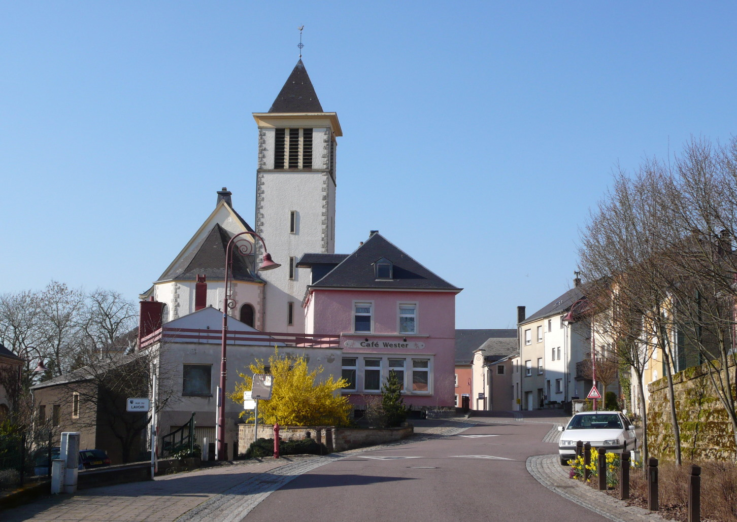 Le centre de Reckange-sur-Mess (Luxembourg) et son église